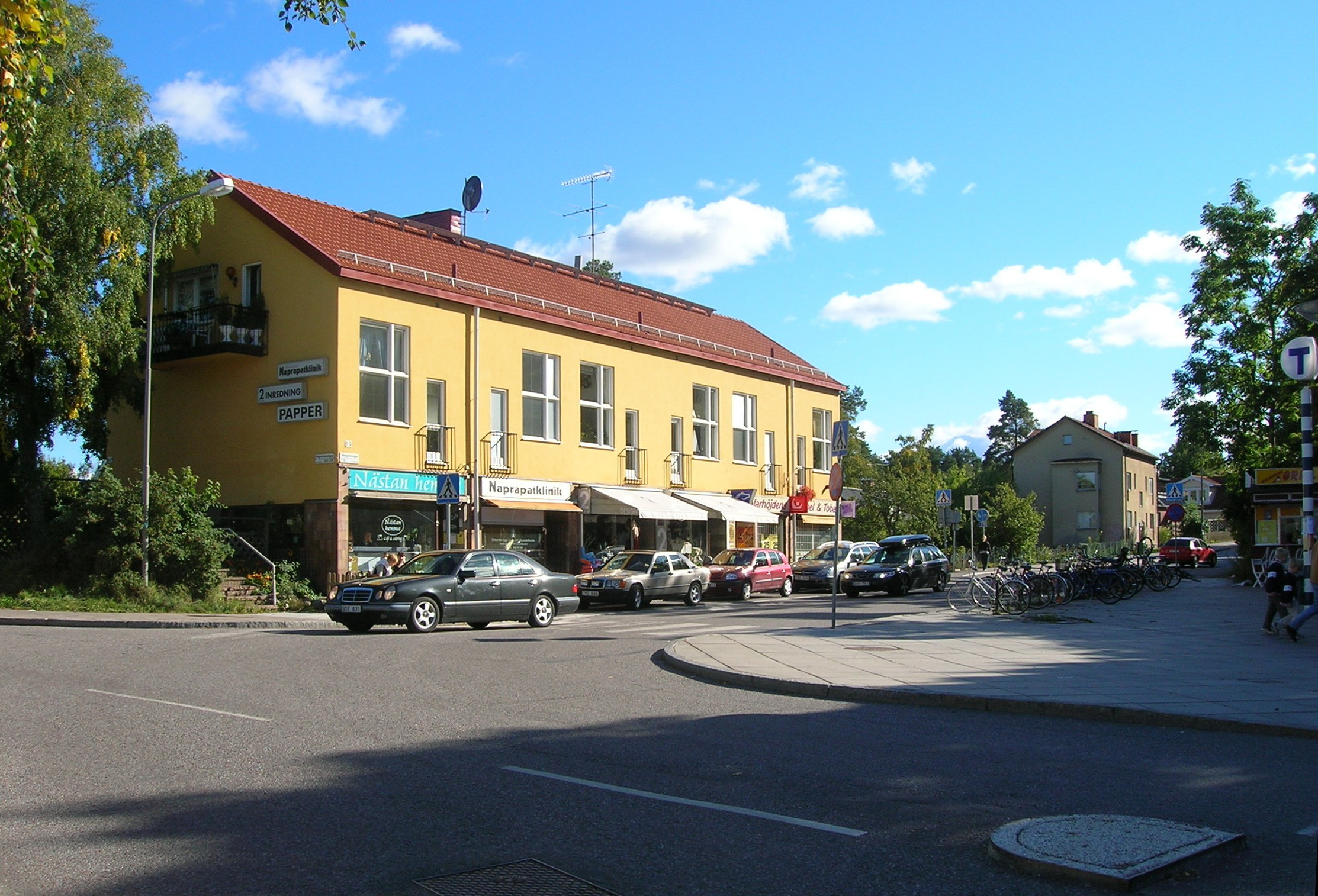 Slättgårdsvägen 1-3 från 1937 i Mälarhöjdens centrum, Stockholm. Arkitekter Ancker-Gate-Lindegren